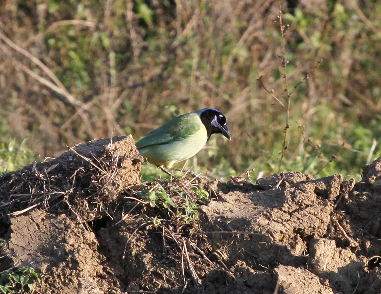 Green Jay / Chara Verde Cyanocorax luxuosus, between Linares and Montemorelos, Huertas, Nuevo León, Mexico.